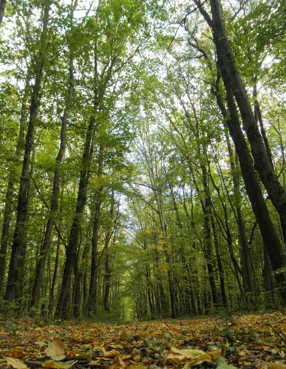 «Чорноліський», Знам'янський р-н, Богданівське лісництво